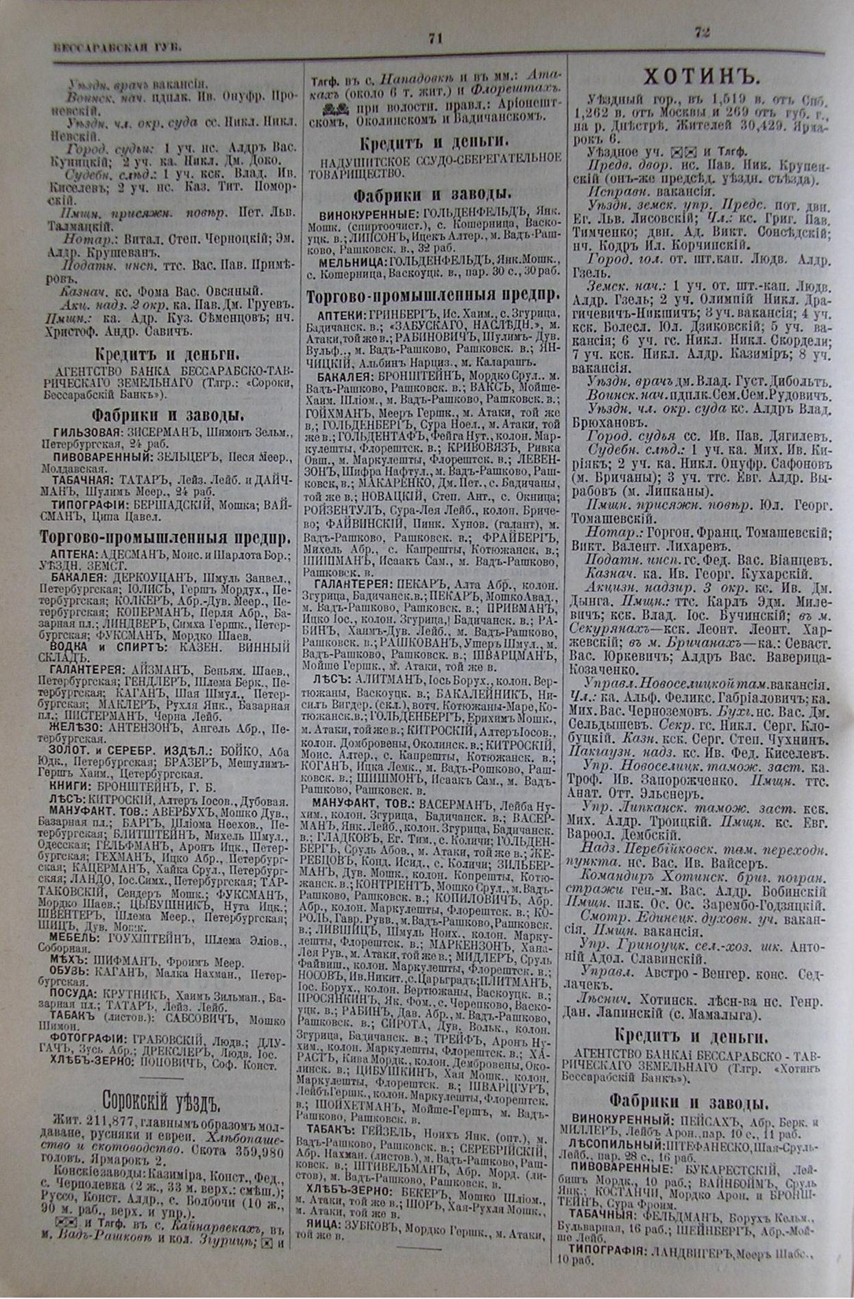 Стр. 70-72 (Сороки, Сорокский уезд, Хотин) из адрес-календаря Российской империи "Вся Россия", 1902.